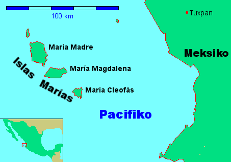 Mapo de insularo Islas Marías, kreita per GIMP. La bildon mi kreis por Vikipedio kaj deklaras ĝin publika havaĵo.